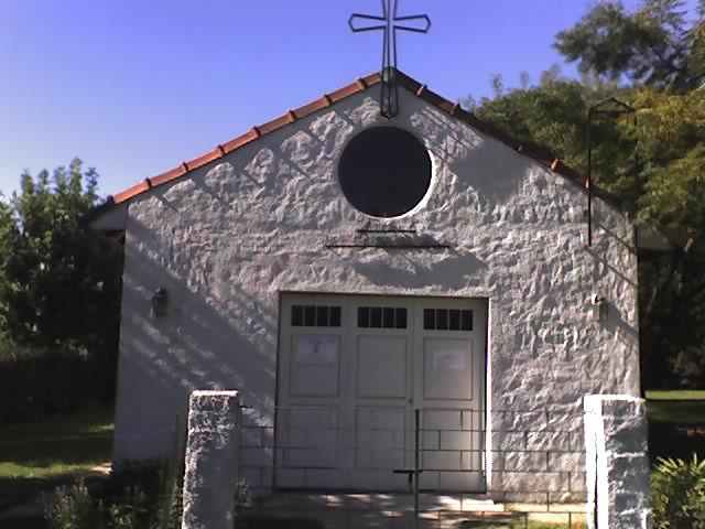 Town of Veinte de Junio, La Matanza Partido, Buenos Aires Province.